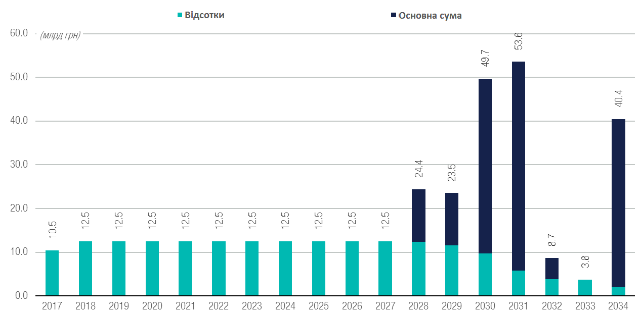 Графік погашення докапіталізаційних ОВДП та відсотків за ними